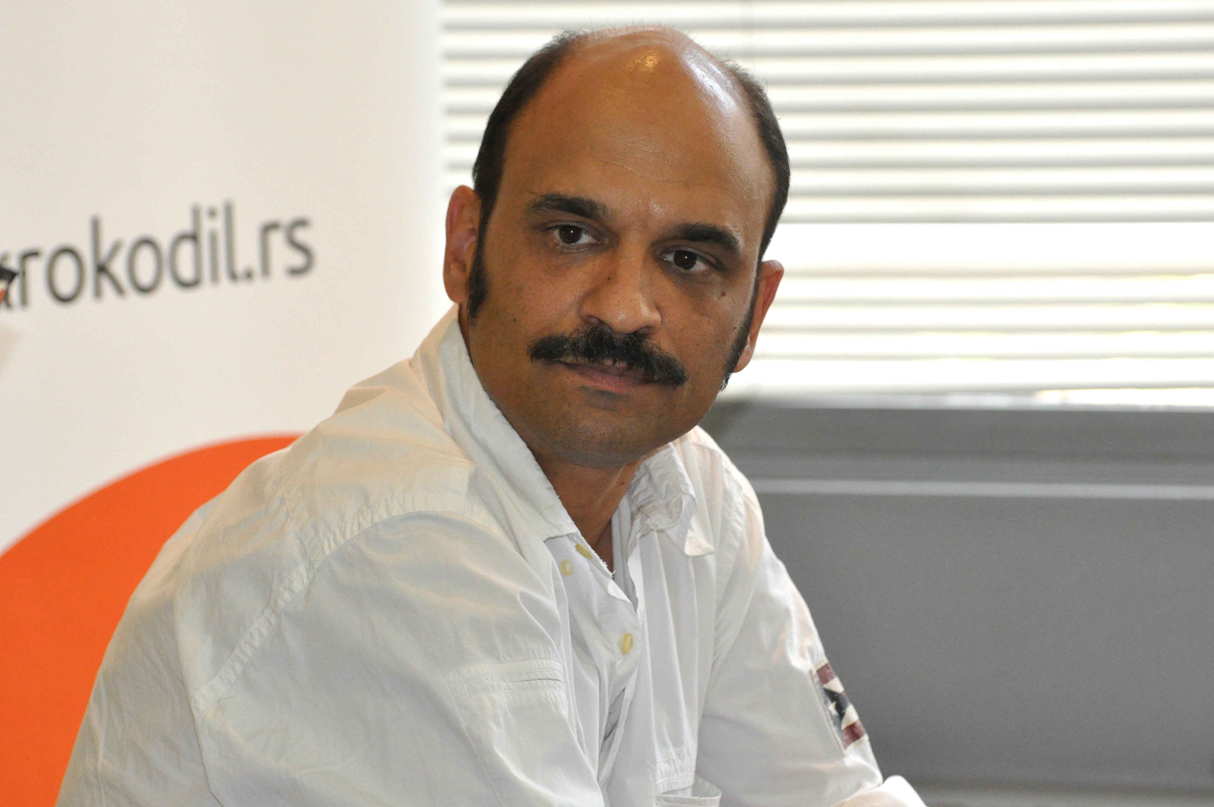 Иван Јевтовић српски глумац